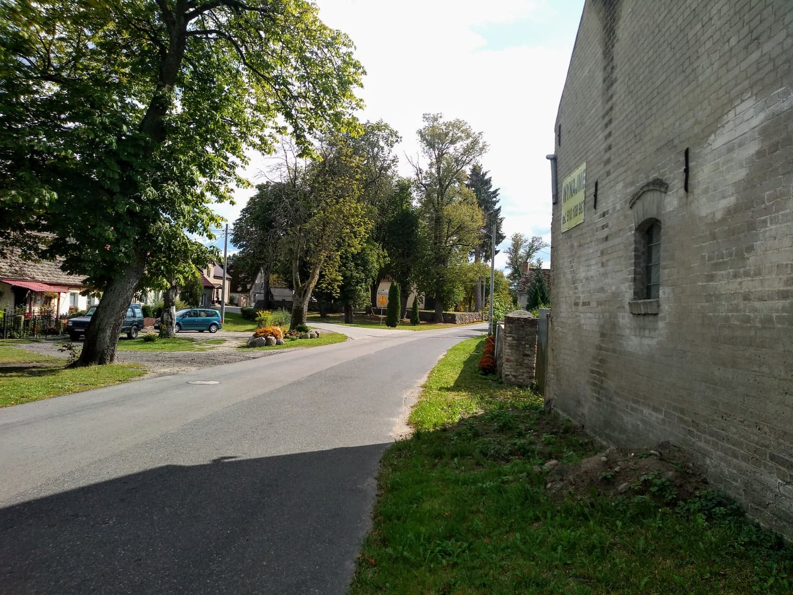 Wysiedle, Kościół ewangelicki, ob. rzym.-kat. Św. Trójcy, wieża drewn. XVIII